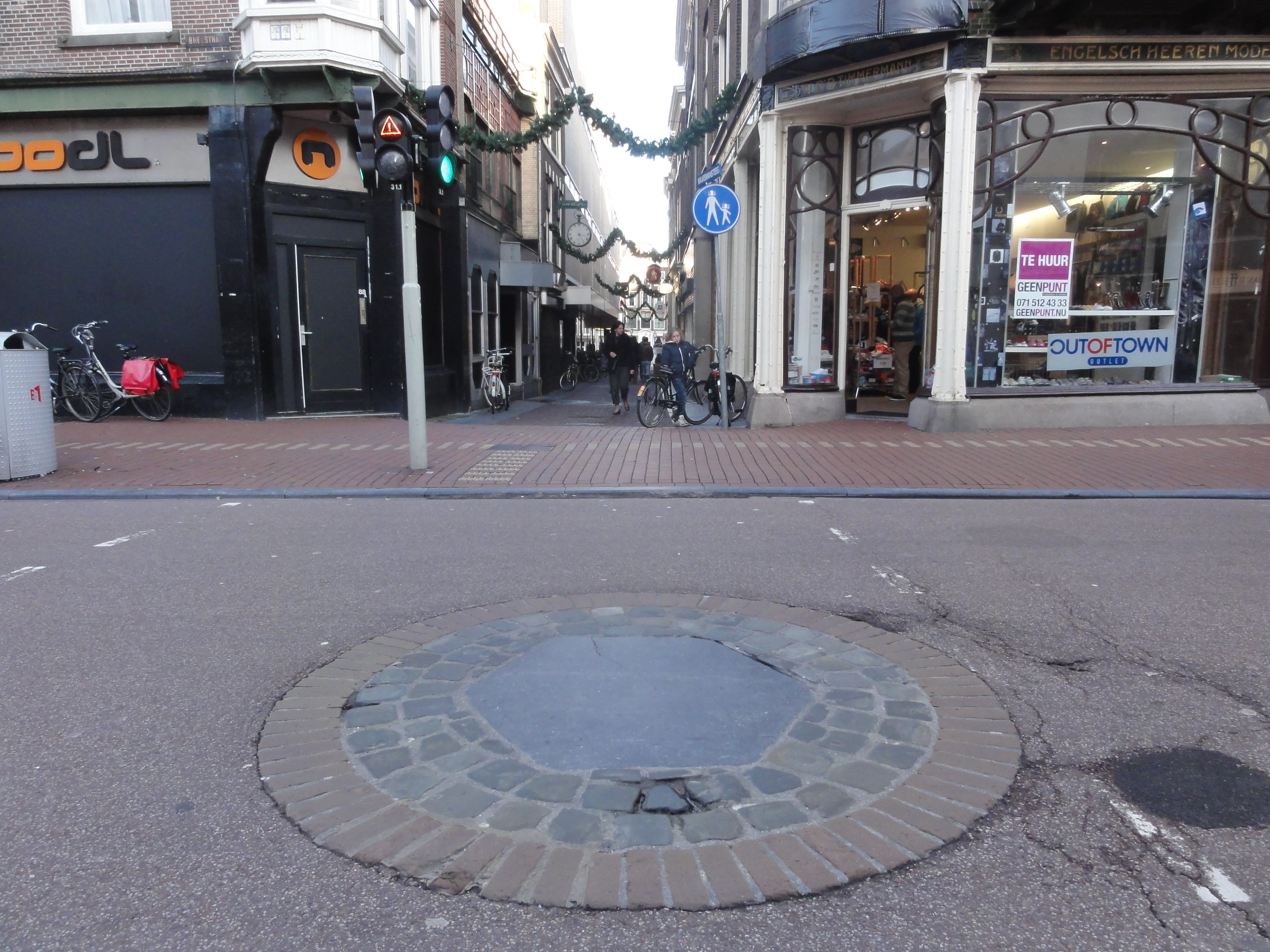 De Blauwe Steen in Leiden ligt in de Breestraat ter hoogte van de Maarsmansteeg, en markeert de plek waar de vier oudste stadskwartieren samenkwamen.